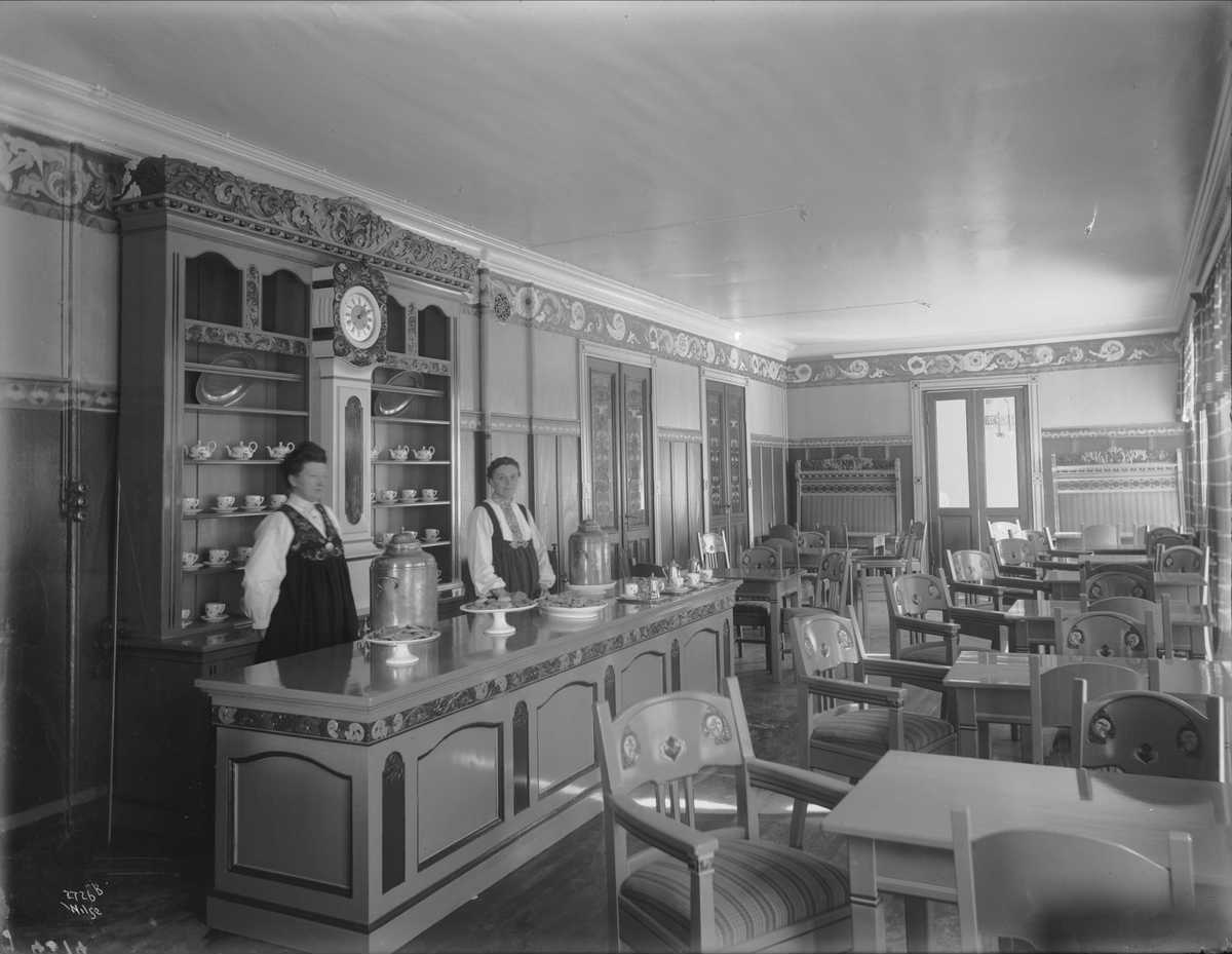 Kaffistova på Stortorvet, kafe, interiør, serveringsdamer